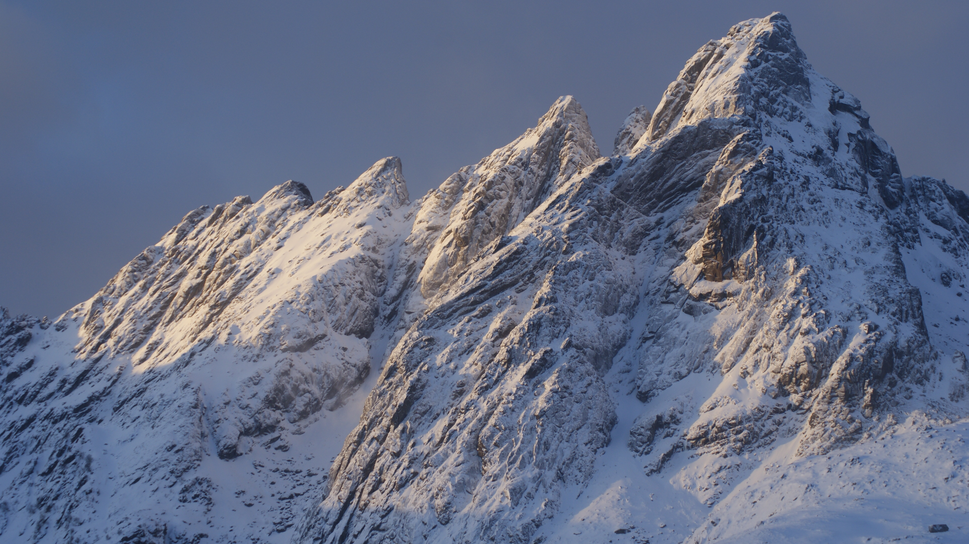 Skottinden in winter sunshine. Vestvågøya, Lofoten, Norway.